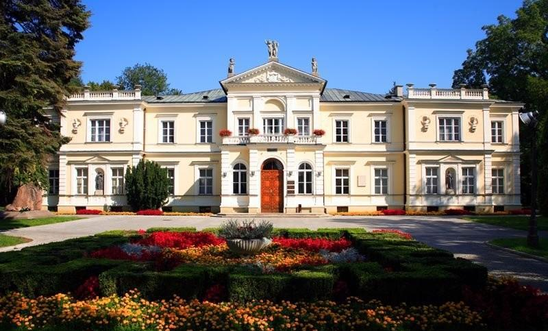 Warszawa (Polska)